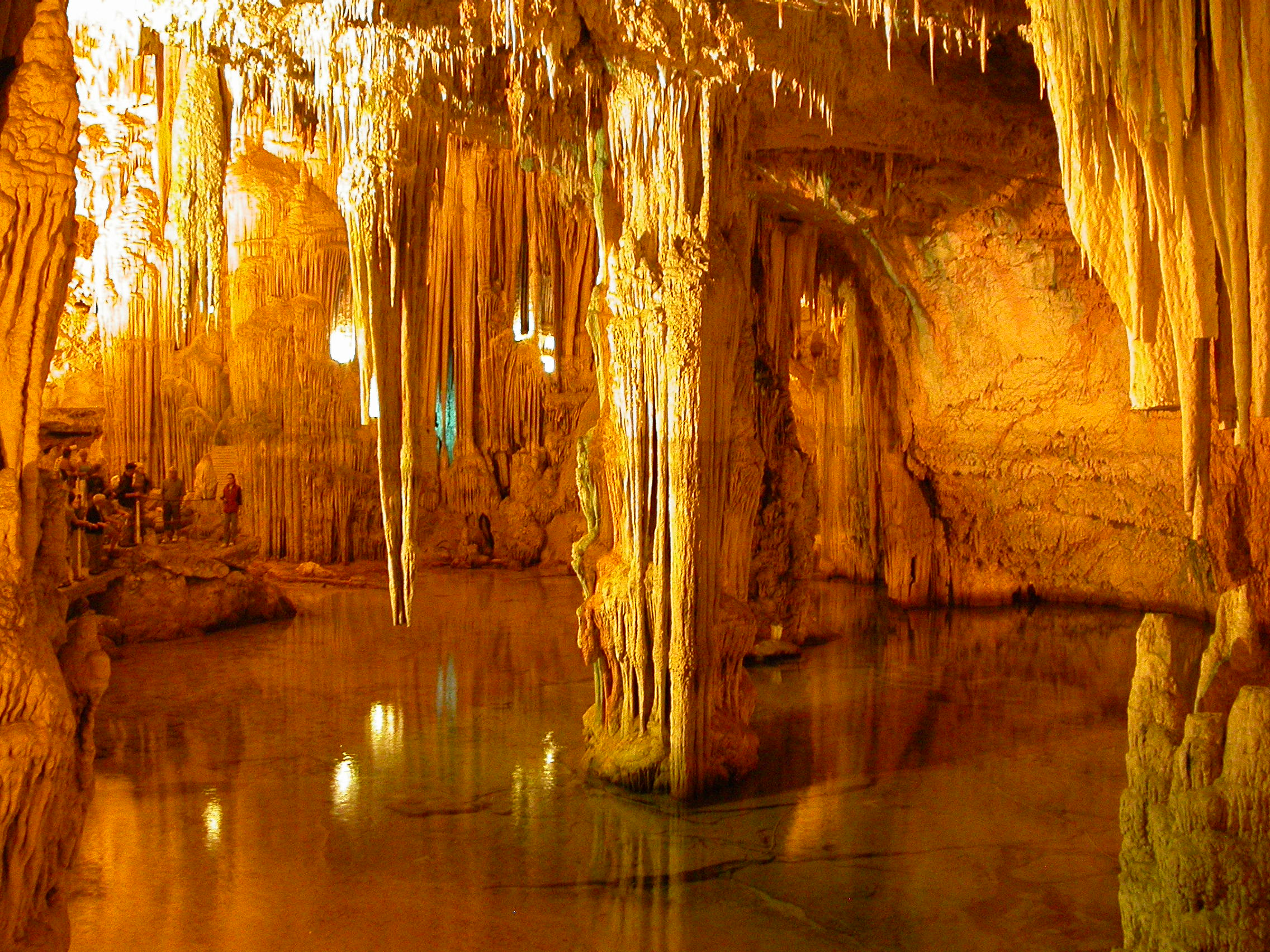 Grotta di Nettuno, Sardinien